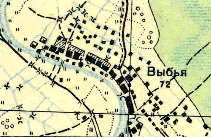 Топографическая карта Ленинградской области, квадрат О-35-9-В-г (Выбья), деревня Выбье